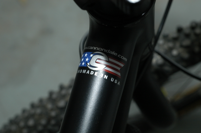 MTB Cannondale